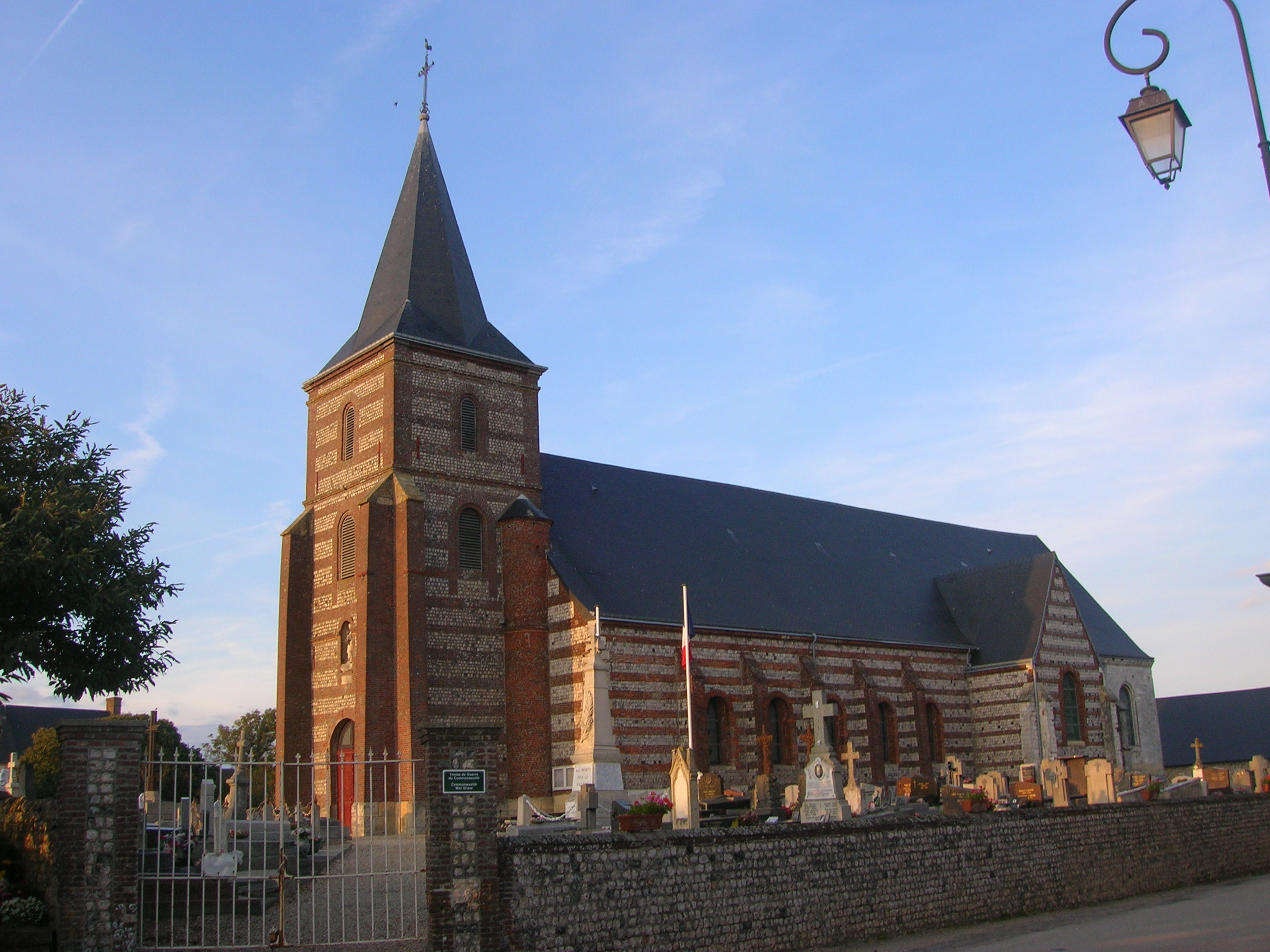 Eglise Saint-Pierre d'Eletot en Seine-Maritime